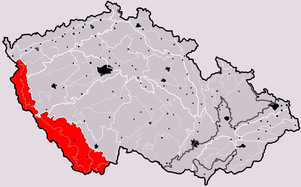 Poloha geomorfologické subprovincie (soustavy) Šumavská subprovincie v rámci České republiky. Hercynský systém Hercynská pohoří I Česká vysočina I1 (I) Šumavská subprovincie